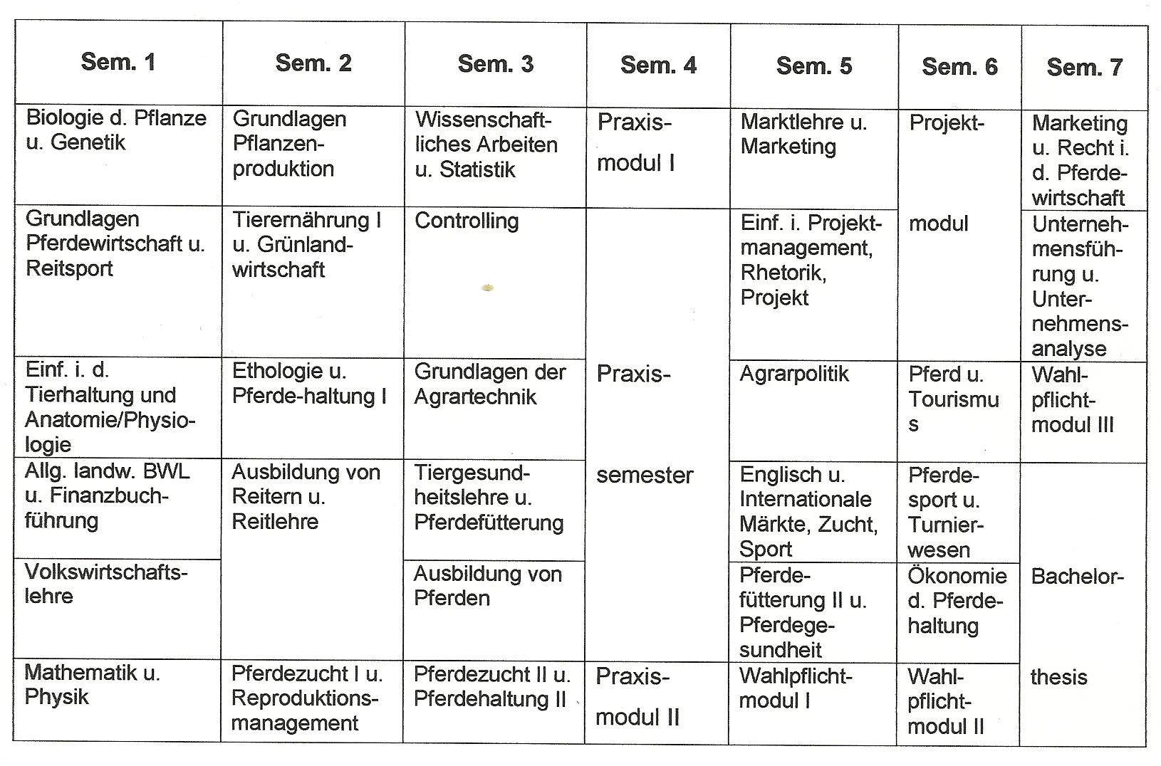 Modulplan Nürtingen Sem. 1 Sem. 2 Sem. 3 Sem. 4 Sem. 5 Sem. 6 Sem. 7 Biologie d. Pflanze u. Genetik Grundlagen Pflanzen- produktion Wissenschaftliches Arbeiten u. Statistik Praxismodul I Marktlehre u. Marketing Projekt- Marketing u. Recht i. d. Pferdewirtschaft Grundlagen Pferdewirtschaft u. Reitsport Tieremährung I u. Grünland-wirtschaft Controlling Einf. i. Projektmanagement, Rhetorik, Projekt modul Untemeh-mensfüh-rung u. Unternehmensanalyse Einf. i. d. Tierhaltung und Anatomie/Physiologie Ethologie u. Pferde-haltung I Grundlagen der Agrartechnik Praxis- Agrarpolitik Pferd u. Tourismu s Wahlpflichtmodul III Allg. landw. BWL u. Finanzbuchführung Ausbildung von Reitern u. Reitlehre Tiergesundheitslehre u. Pferdefütterung semester Englisch u. Internationale Märkte, Zucht, Sport Pferdesport u. Tumier-wesen Volkswirtschafts- lehre Ausbildung von Pferden Pferdefütterung llu. Pferdegesundheit Ökonomie d. Pferdehaltung Bachelor- Mathematik u. Physik Pferdezucht I u. Reproduktionsmanagement Pferdezucht II u. Pferdehaltung II Praxismodul II Wahlpflichtmodul I Wahlpflichtmodul II thesis